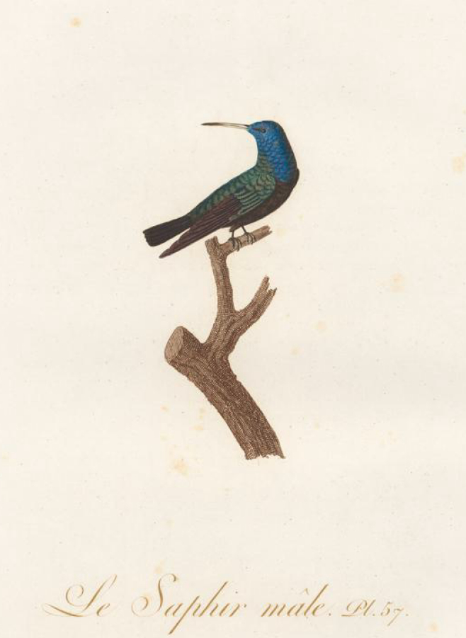 Le Saphir male